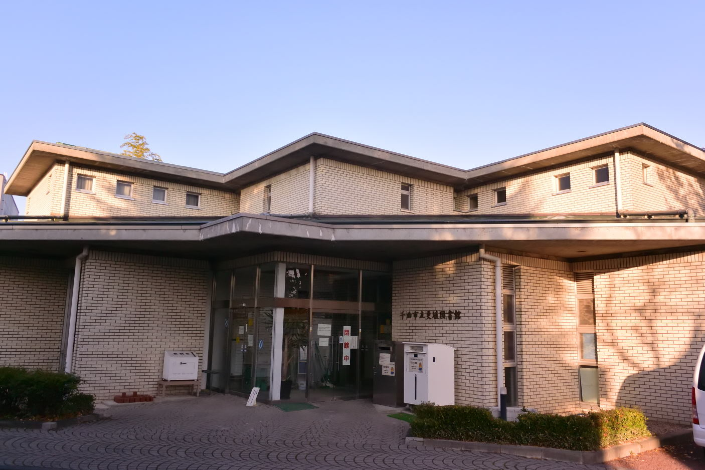 長野県千曲市の市立図書館。